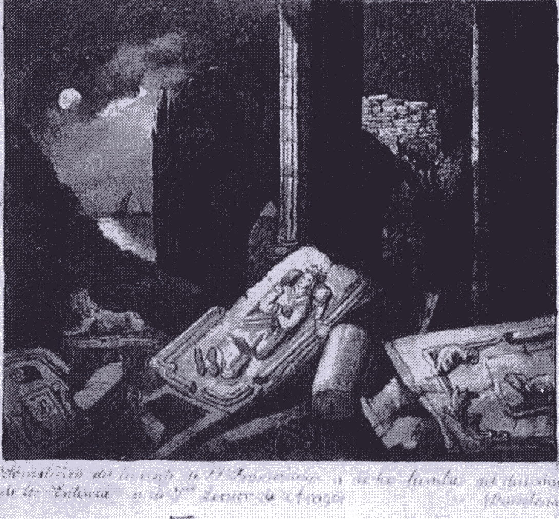 Imagen del Claustro de Fray Menores en ruinas y sus tumbas reales